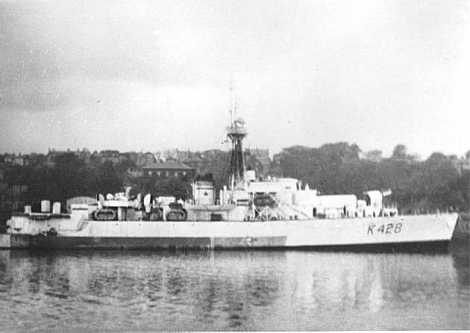 HMCS Loch Alvie